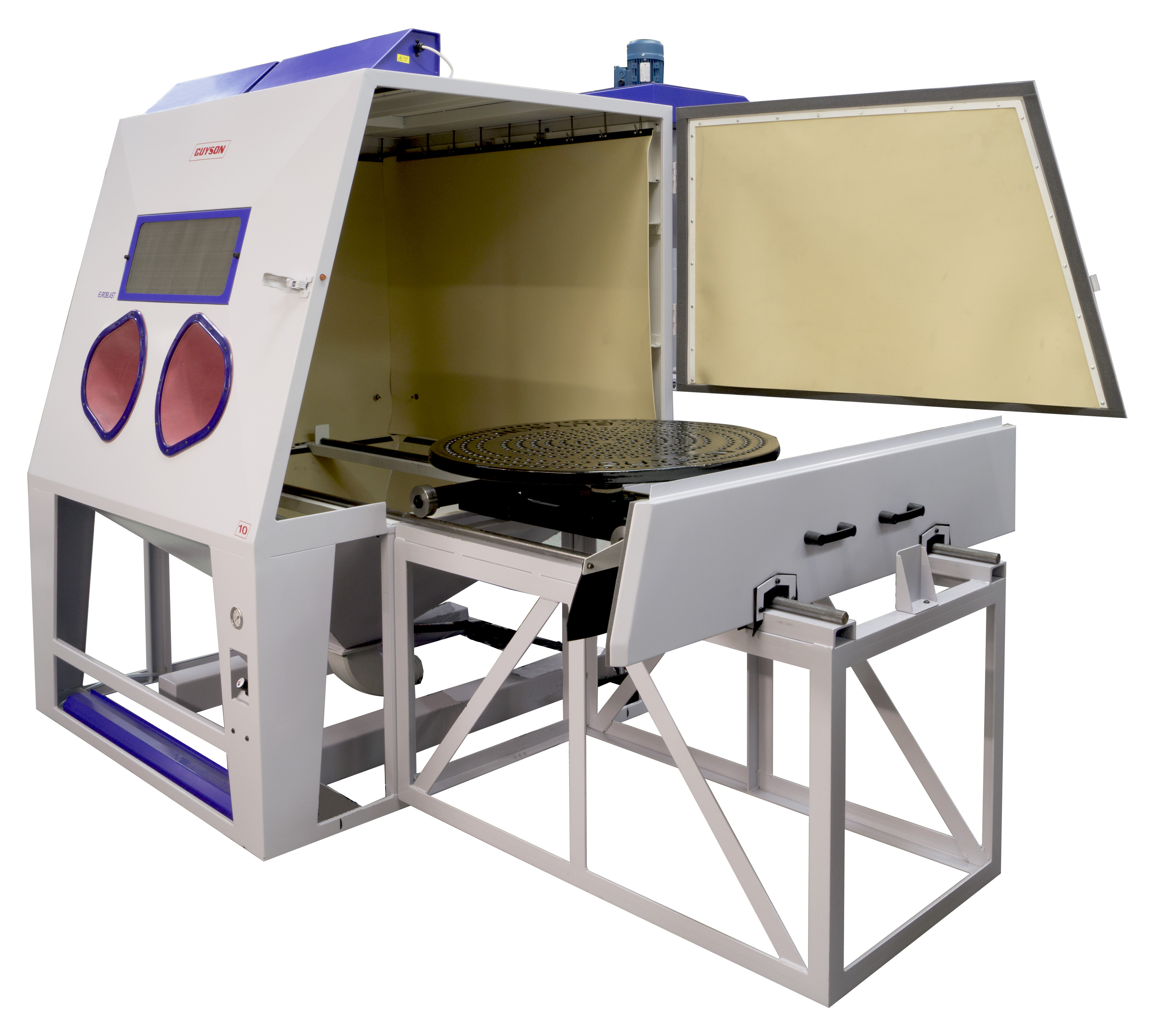 Cabine de sablage avec plateau tournant pour pièces de grandes dimensions